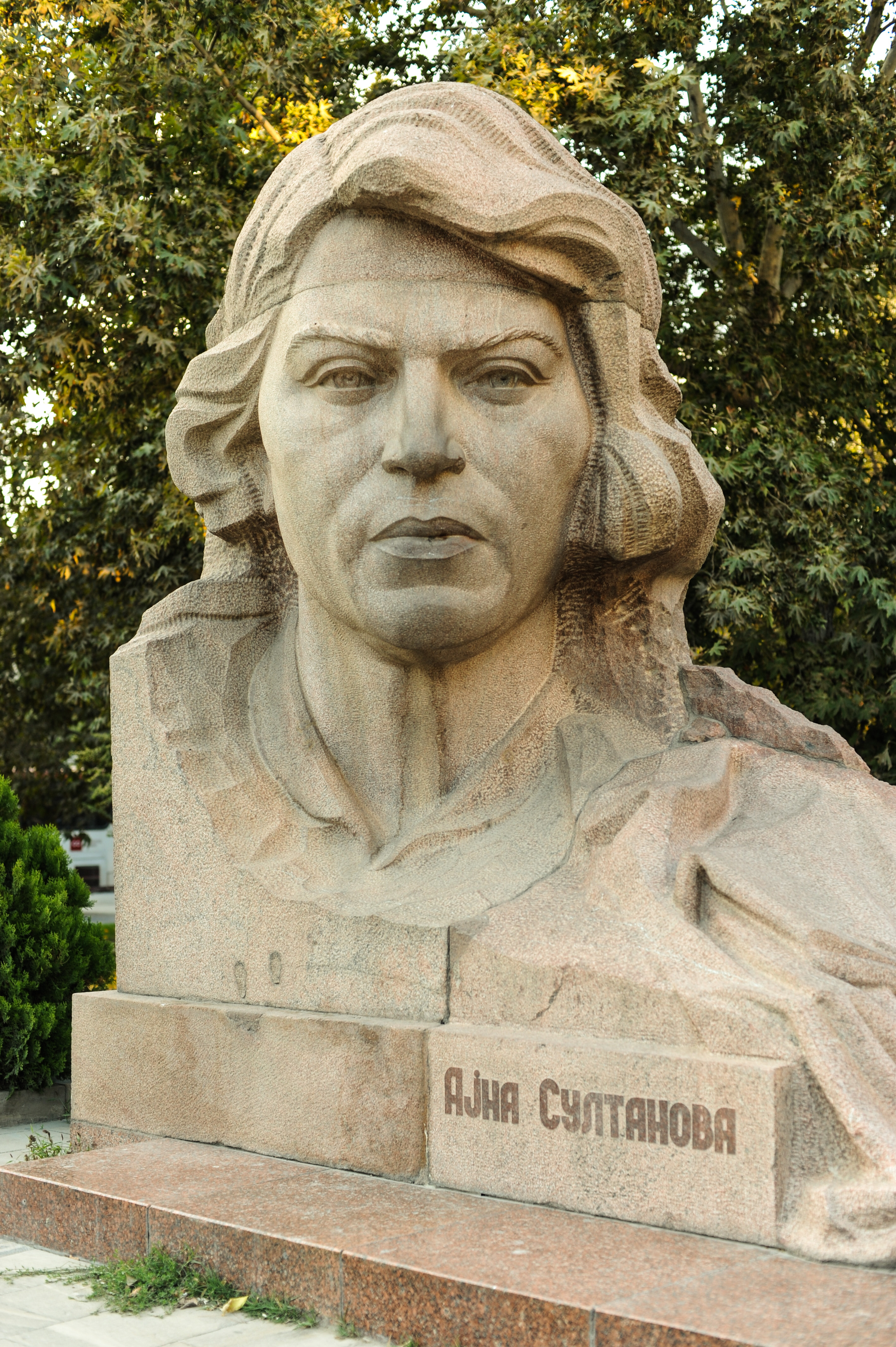 Ayna Sultanova heykəli, Bakı şəhəri, Azərbaycan.